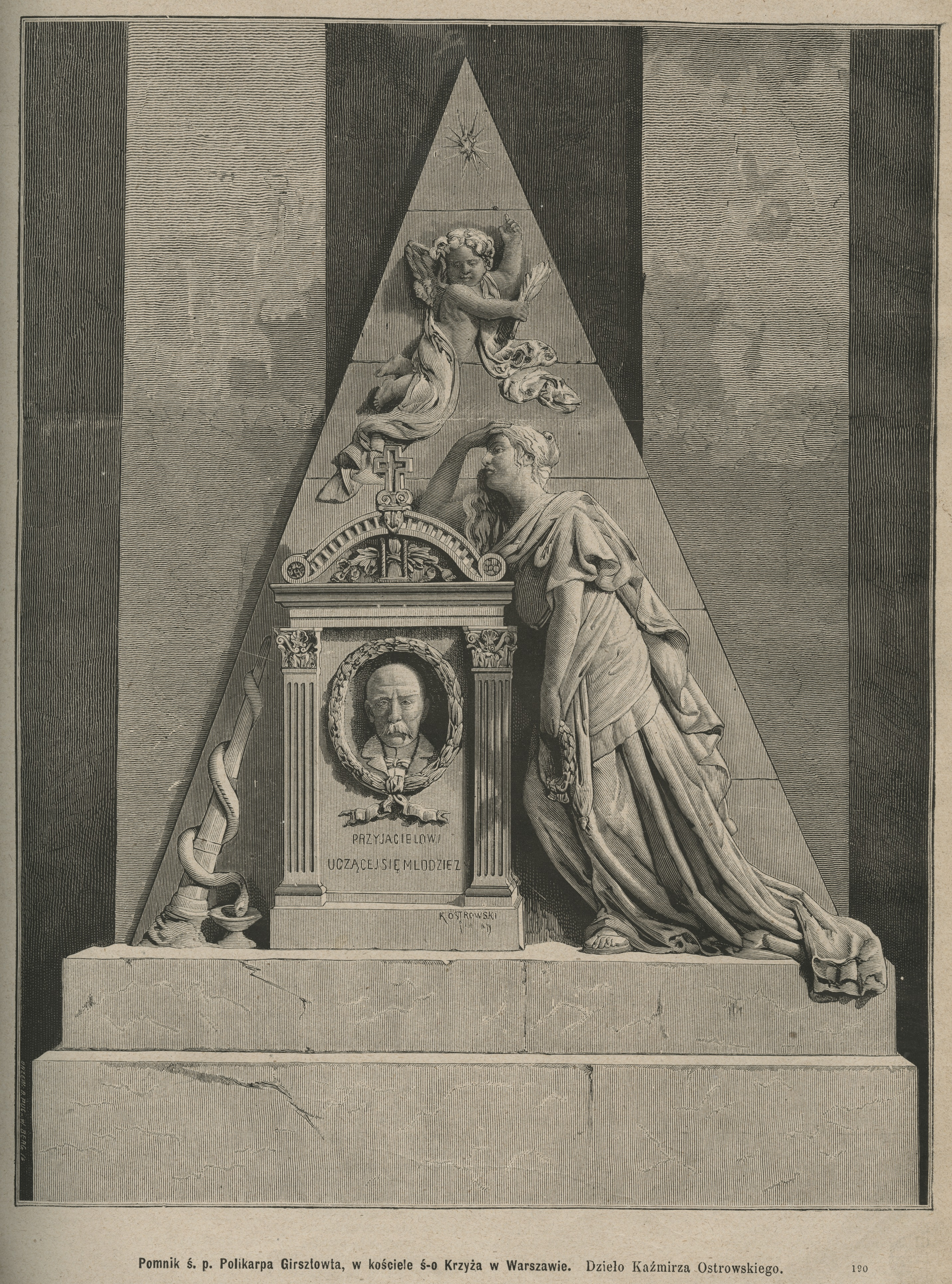 Pomnik ś. p. Polikarpa Girsztowta, w kościele ś-o Krzyża w Warszawie : Dzieło Kaźmirza Ostrowskiego